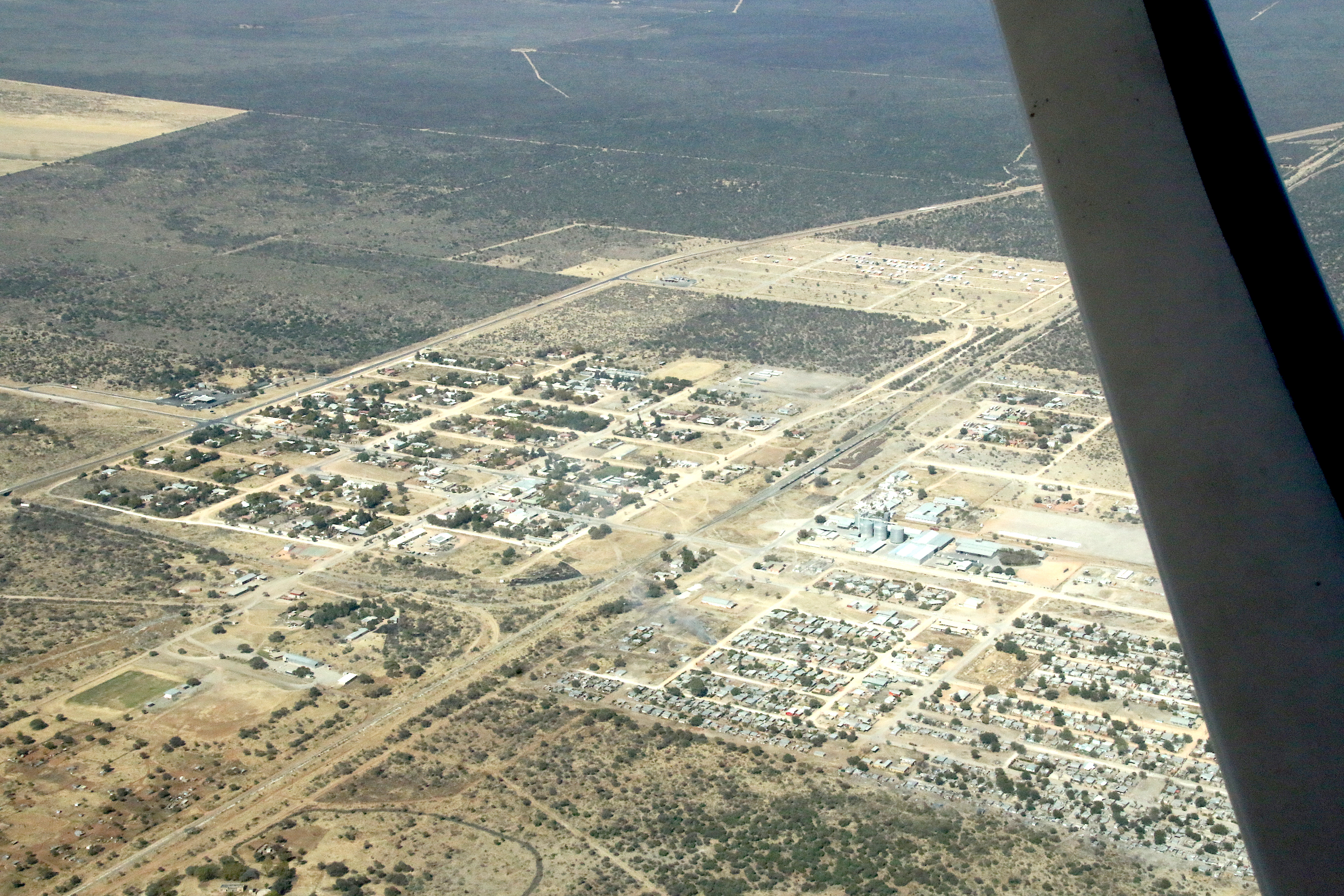 Otavi (2018)